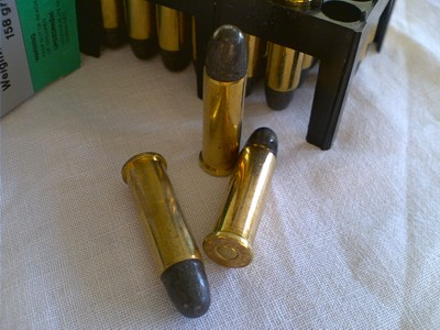 Nábojnice.